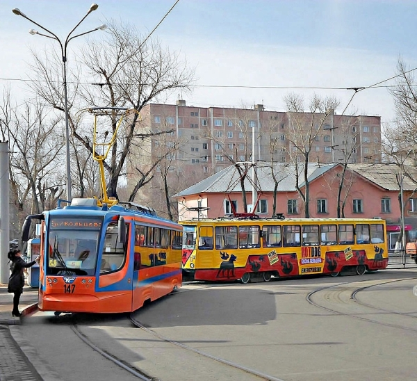 Трамваи КТМ-23 № 147 и КТМ-5 на остановке Вокзал, г. Павлодар, Казахстан